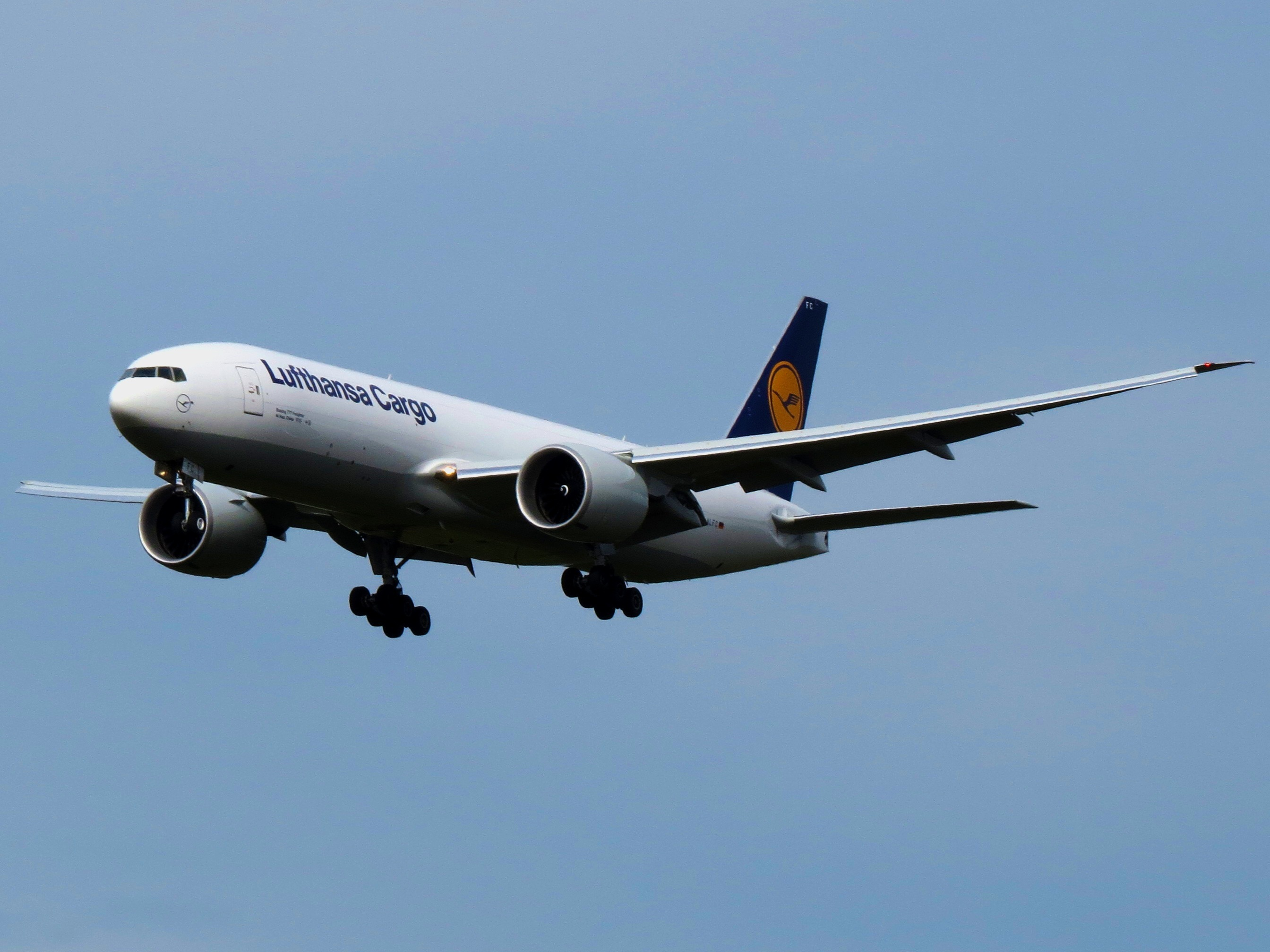 Lufthansa Cargo, Boeing 777-F, D-ALFC "Ni Hao, China 你好，中国" 07.04.2014 FRA